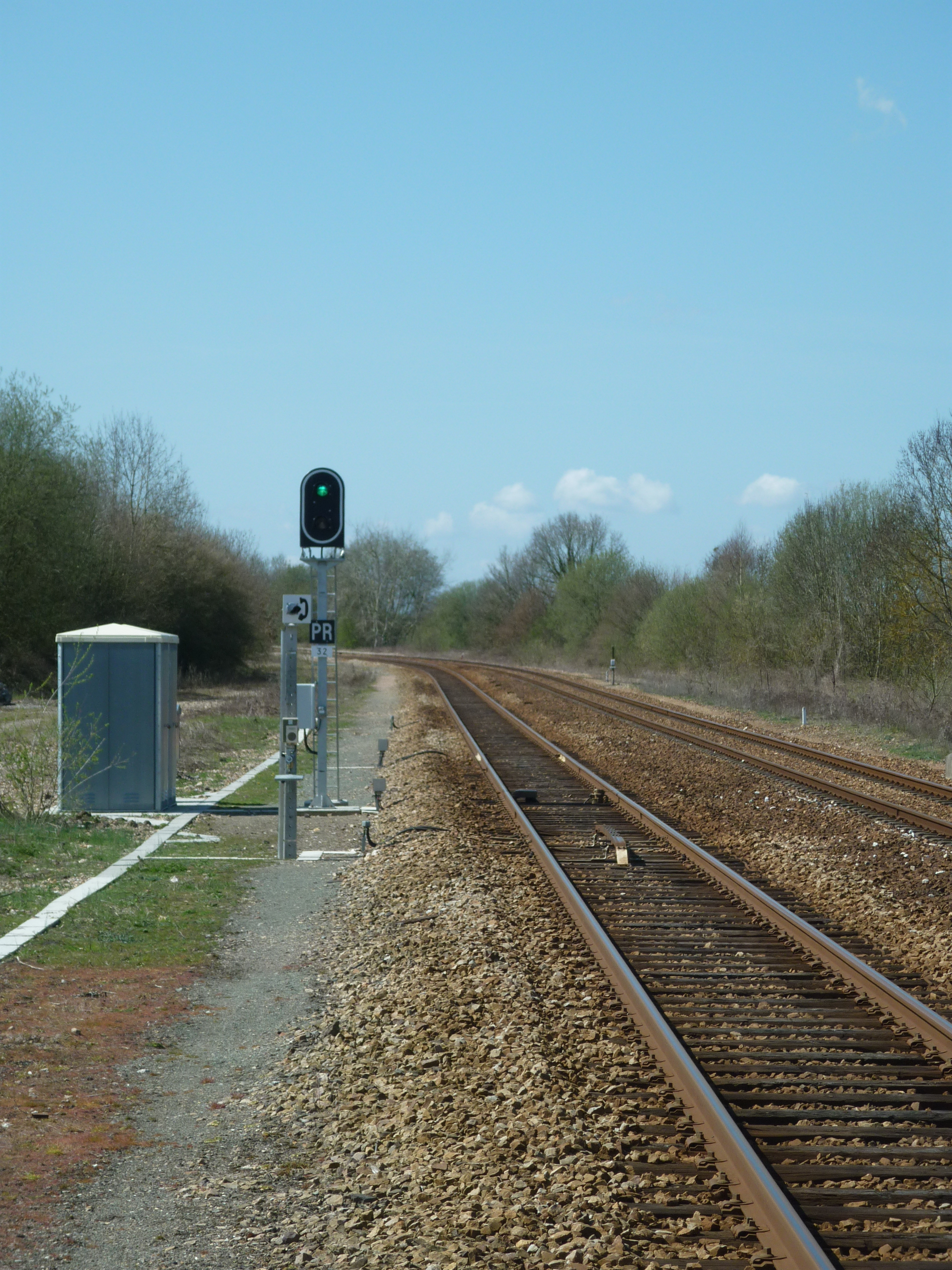 Signal de BAPR en gare de Bourgtheroulde (Eure)